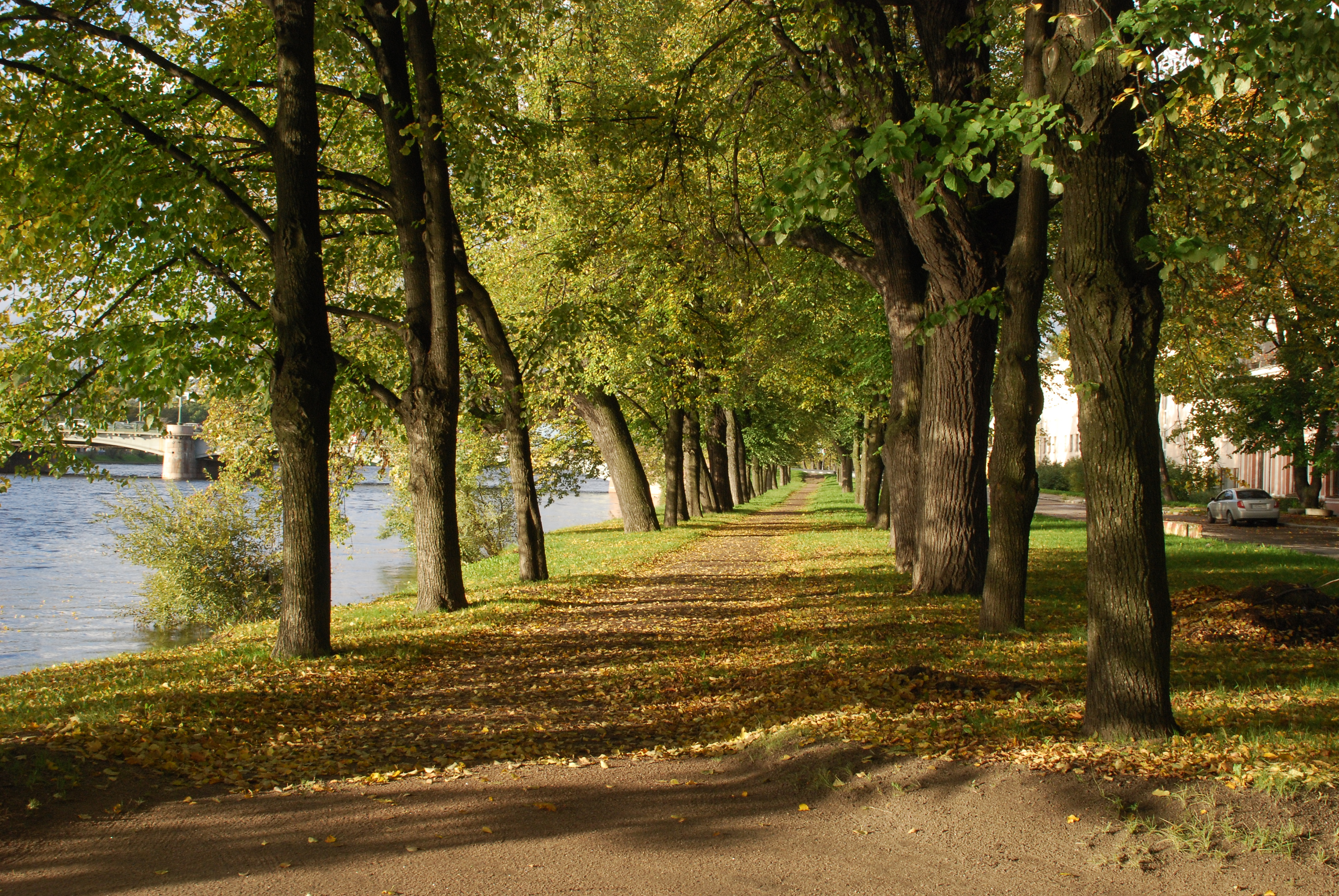 Набережная Малой Невки в Петербурге, вид со стороны Каменноостровского дворца к проспекту